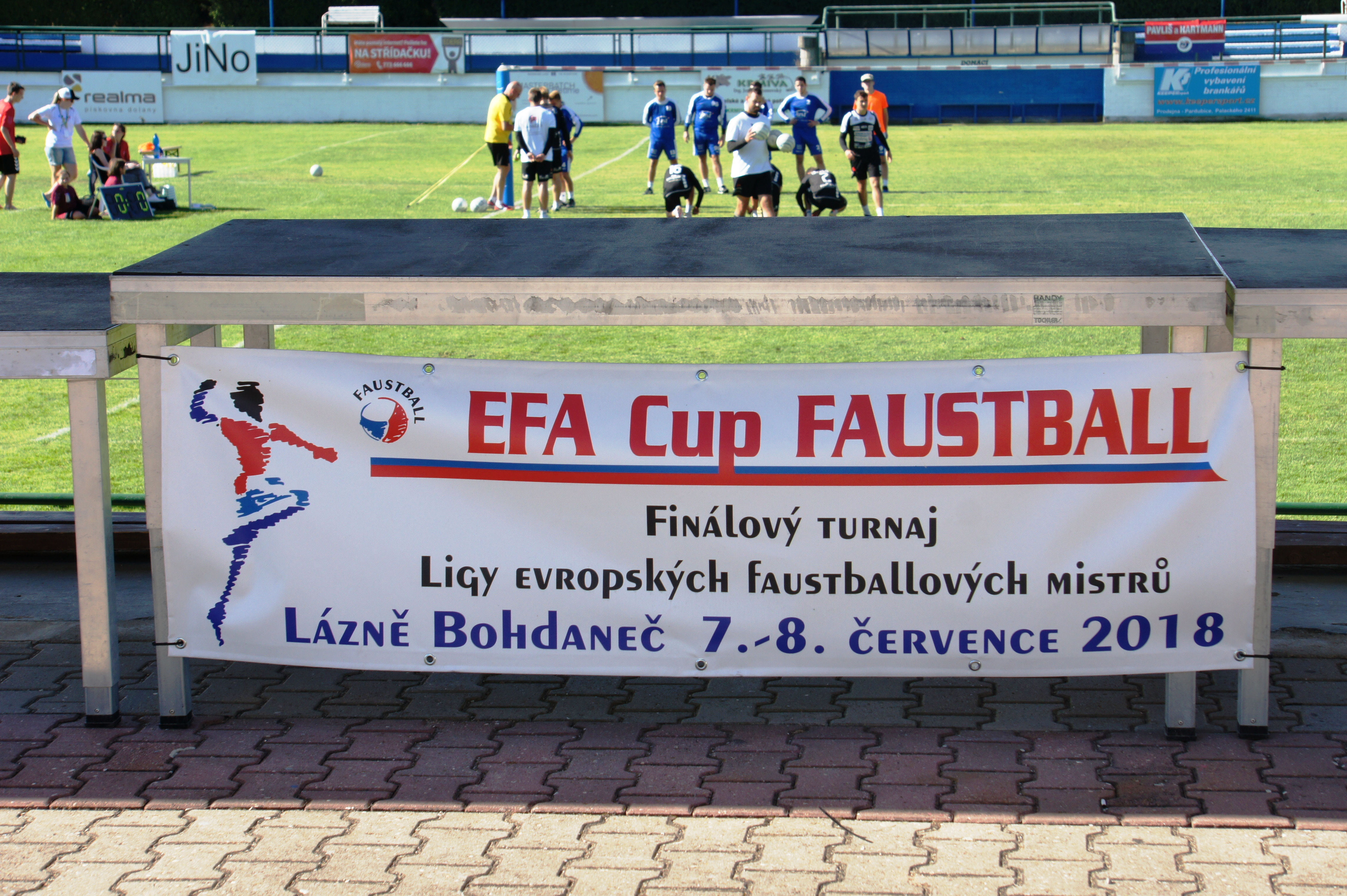 EFA Cup Werbeblache